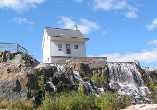 La Petite Maison Blanche du 441 rue Gédéon devenu célèbre après les inondations de 1996 dans la ville de Saguenay au Canada.